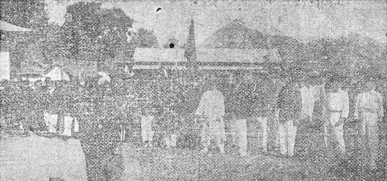 1923년 전국체육대회 정구(제3회 전조선정구대회) 개막식 모습.